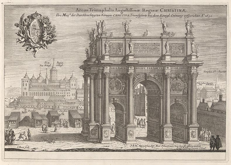 Triumfbåge vid drottning Kristinas kröning. Triumfbågen restes till Kristinas kröning 1650 på det som idag är Gustav Adolfs torg. Byggnaden var tillverkad av trä och duk och dekorerad med erövrade fanor och baner. Triumfbågen stod fram till hösten 1663 eller våren 1664.